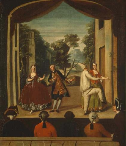 Theaterszene mit Pulcinellen-Darsteller